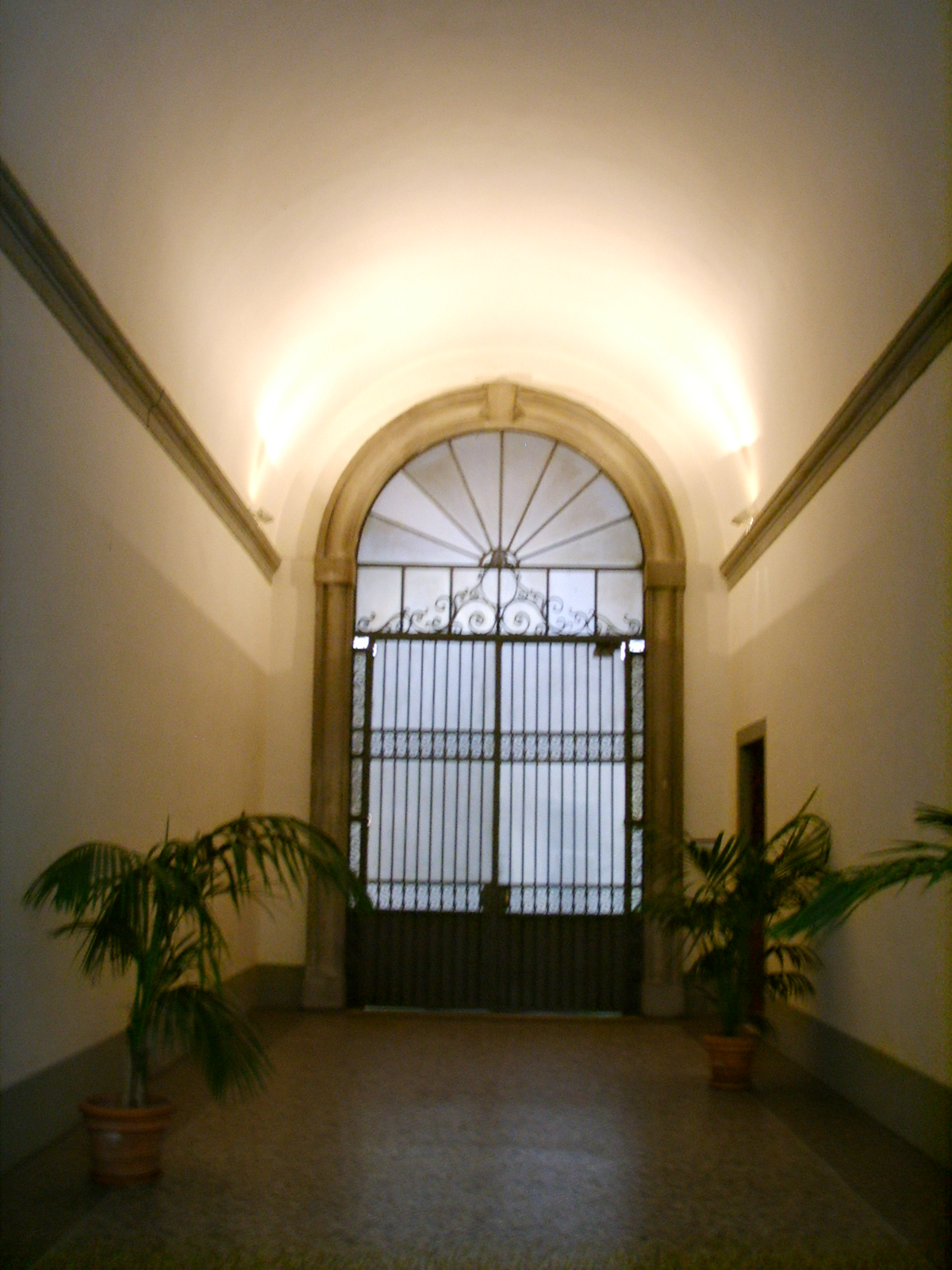 Palazzo manetti atrio